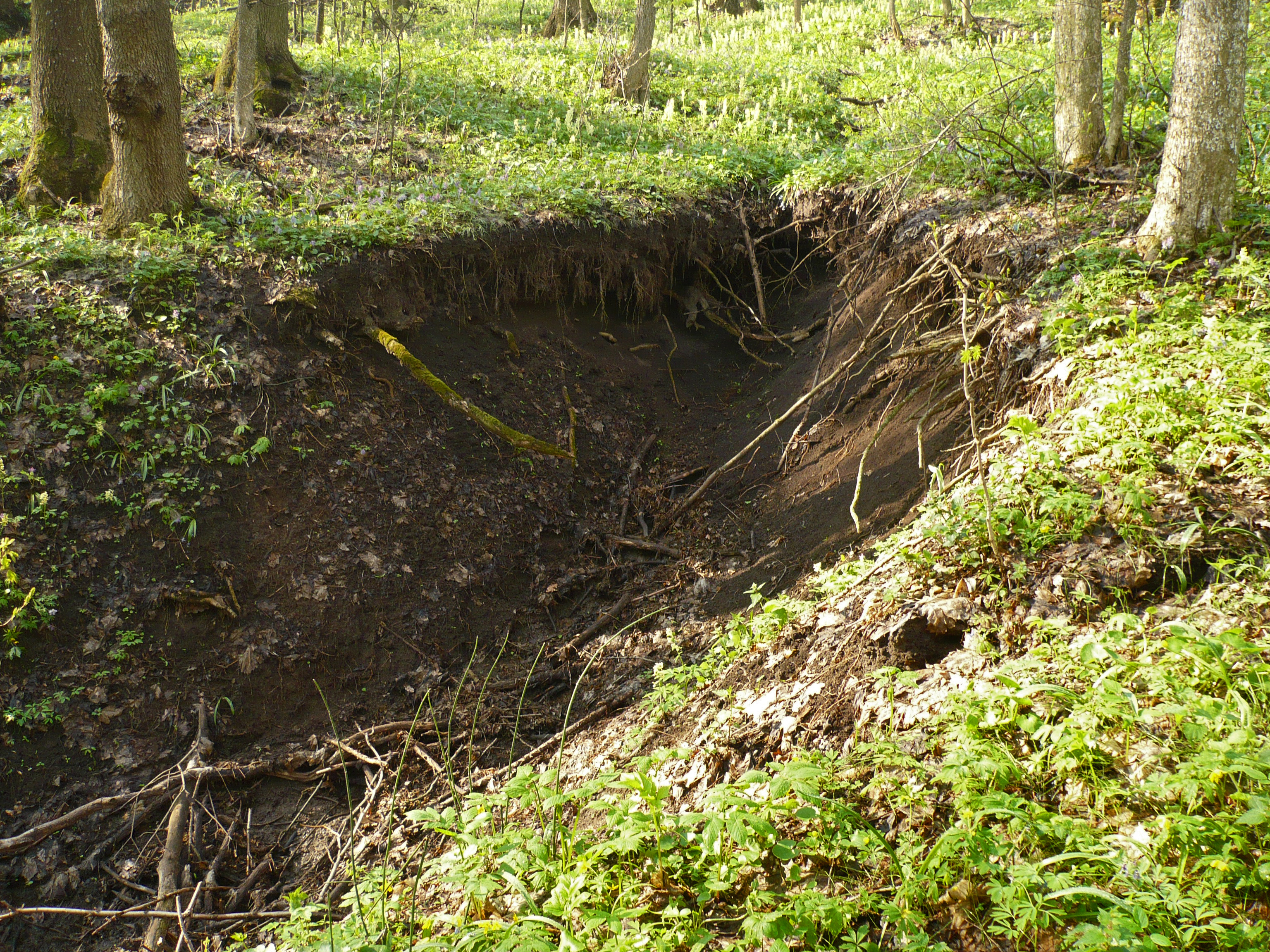 Овраг в лесу 2. Урочище Каменное, прилегающее к балке Каменный лог